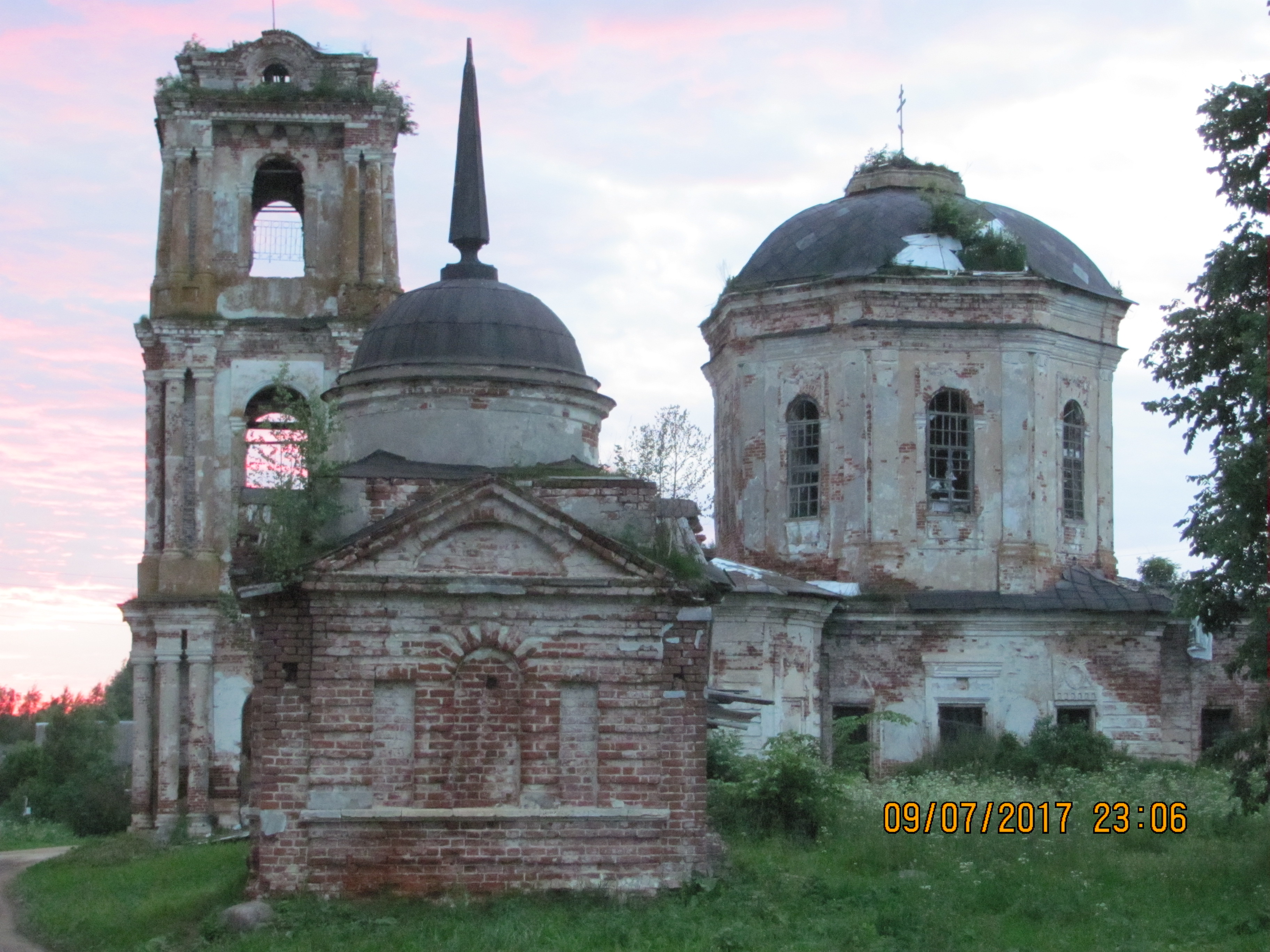 Церковь Троицкая с росписями (Пресвятой Троицы): Первитино, Лихославльский район, Тверская область